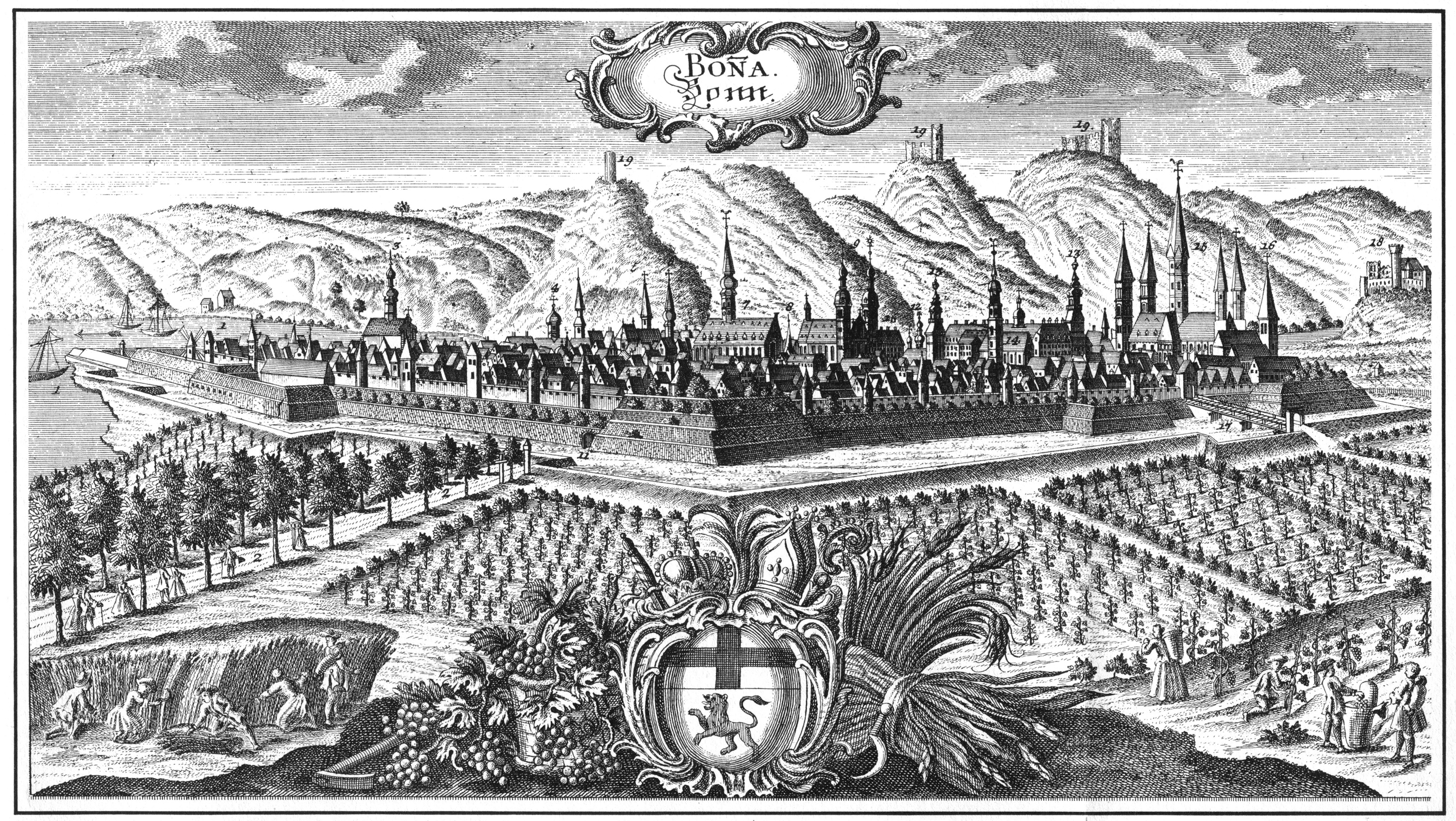 Bonn, Stadtansicht von Nordwesten um 1700 Uploaded with Reworkhelper